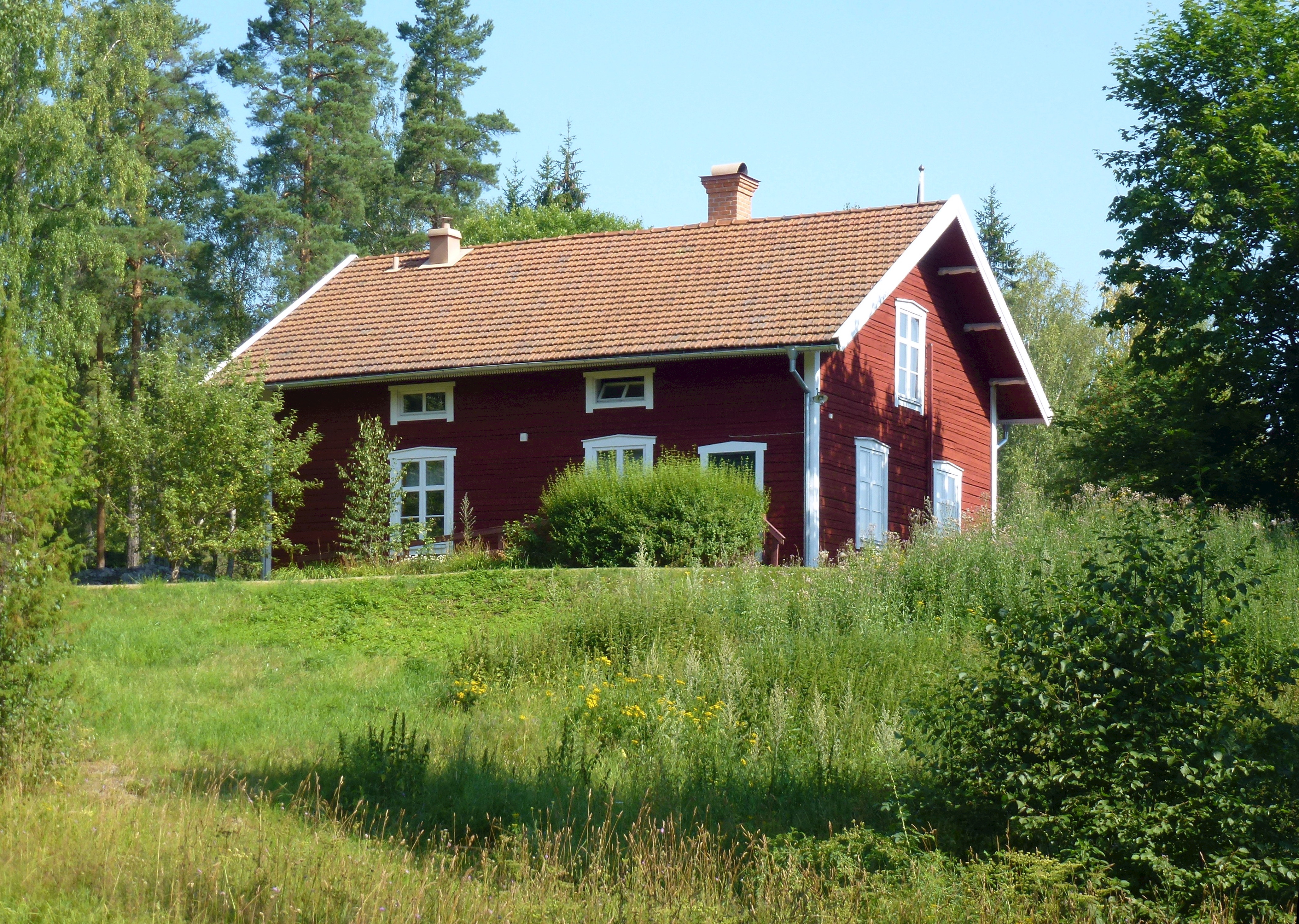 Flobergets gruvor, gruvstugan